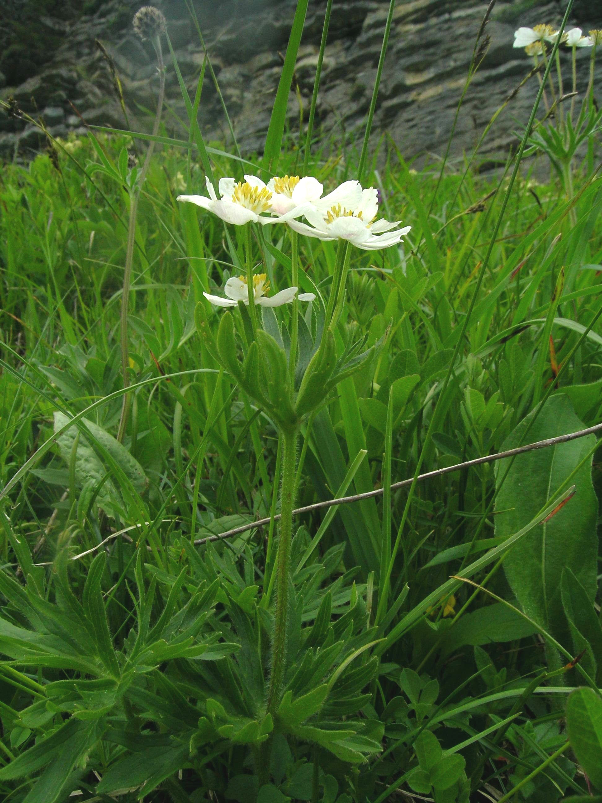 Anemone narcissiflora, Schynige Platte, Kanton Bern, Schweiz